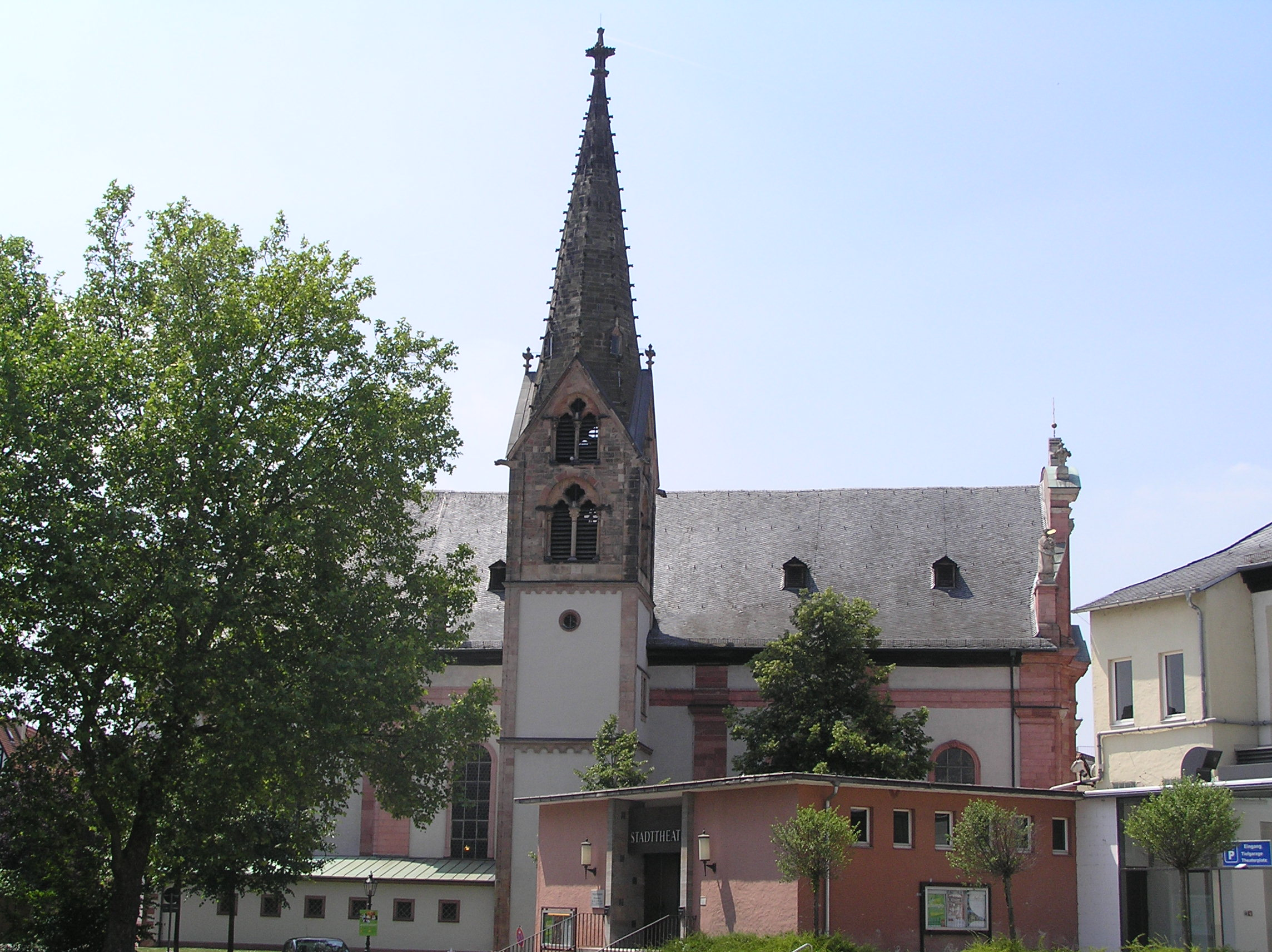 Die Muttergotteskirche in Aschaffenburg vom Theaterplatz aus